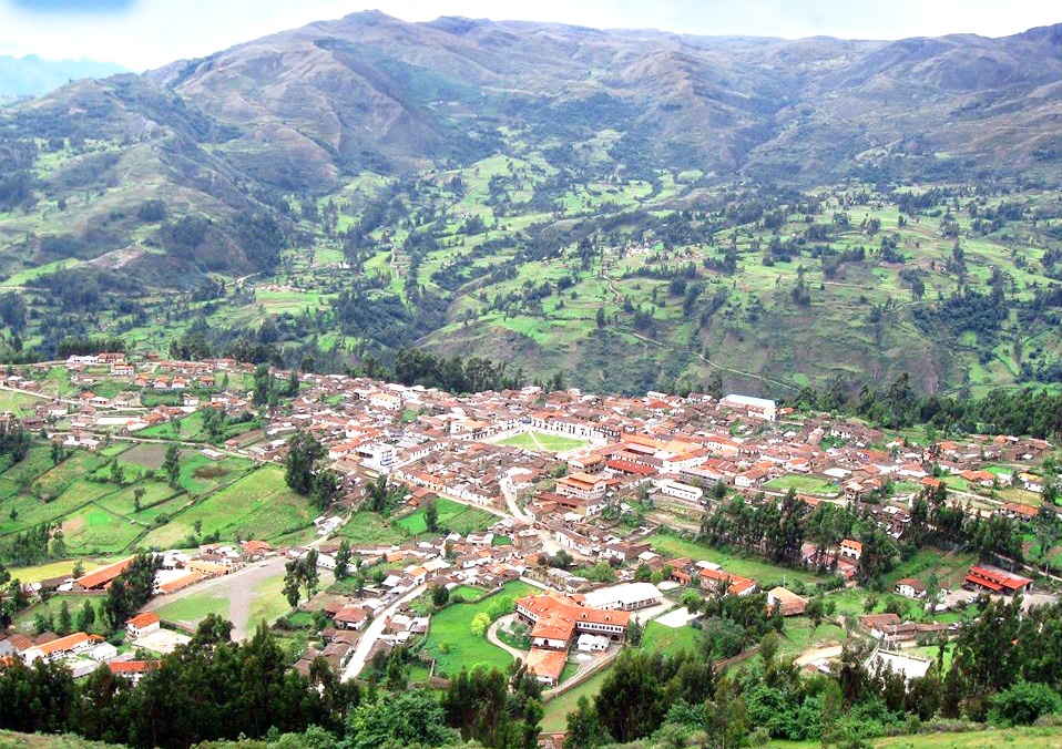 Chacas en 2012